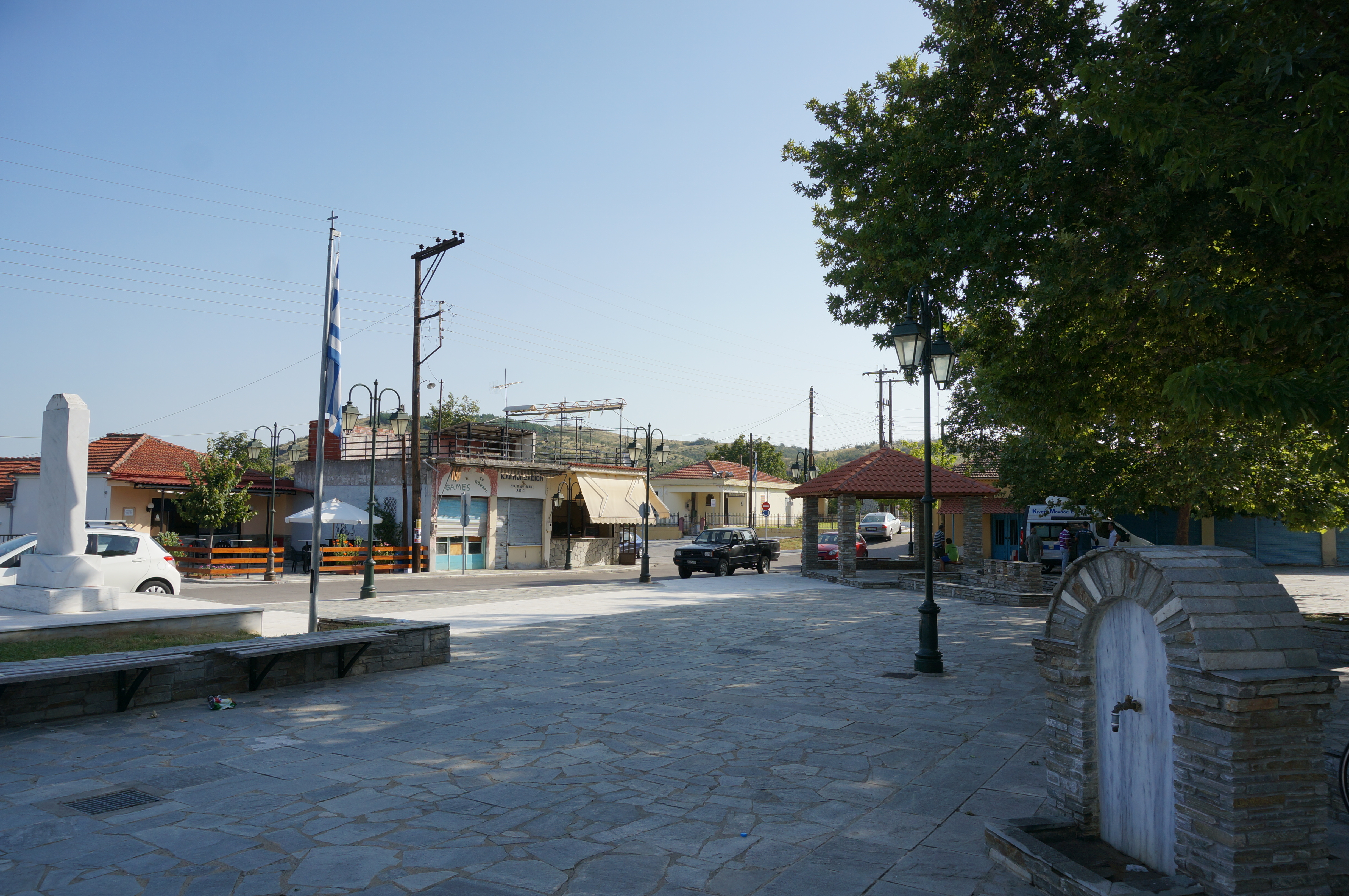 à Evzone.